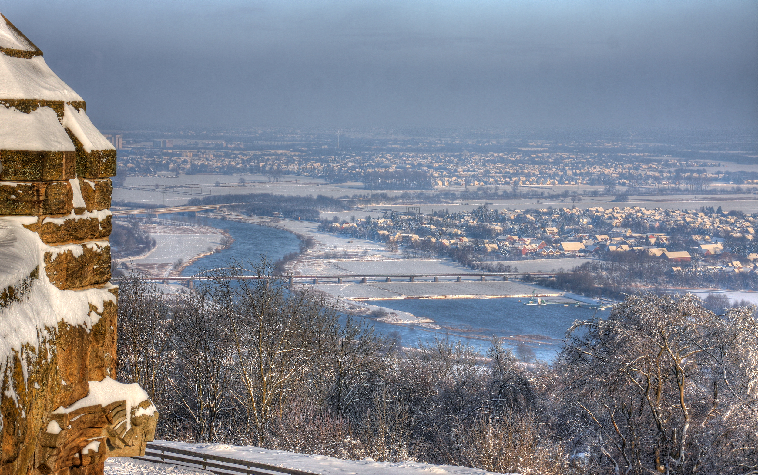 Porta Westfalica, Blick von Kaiser-Wilhelm-Denkmal auf die Weser und den Ortsteil Neesen